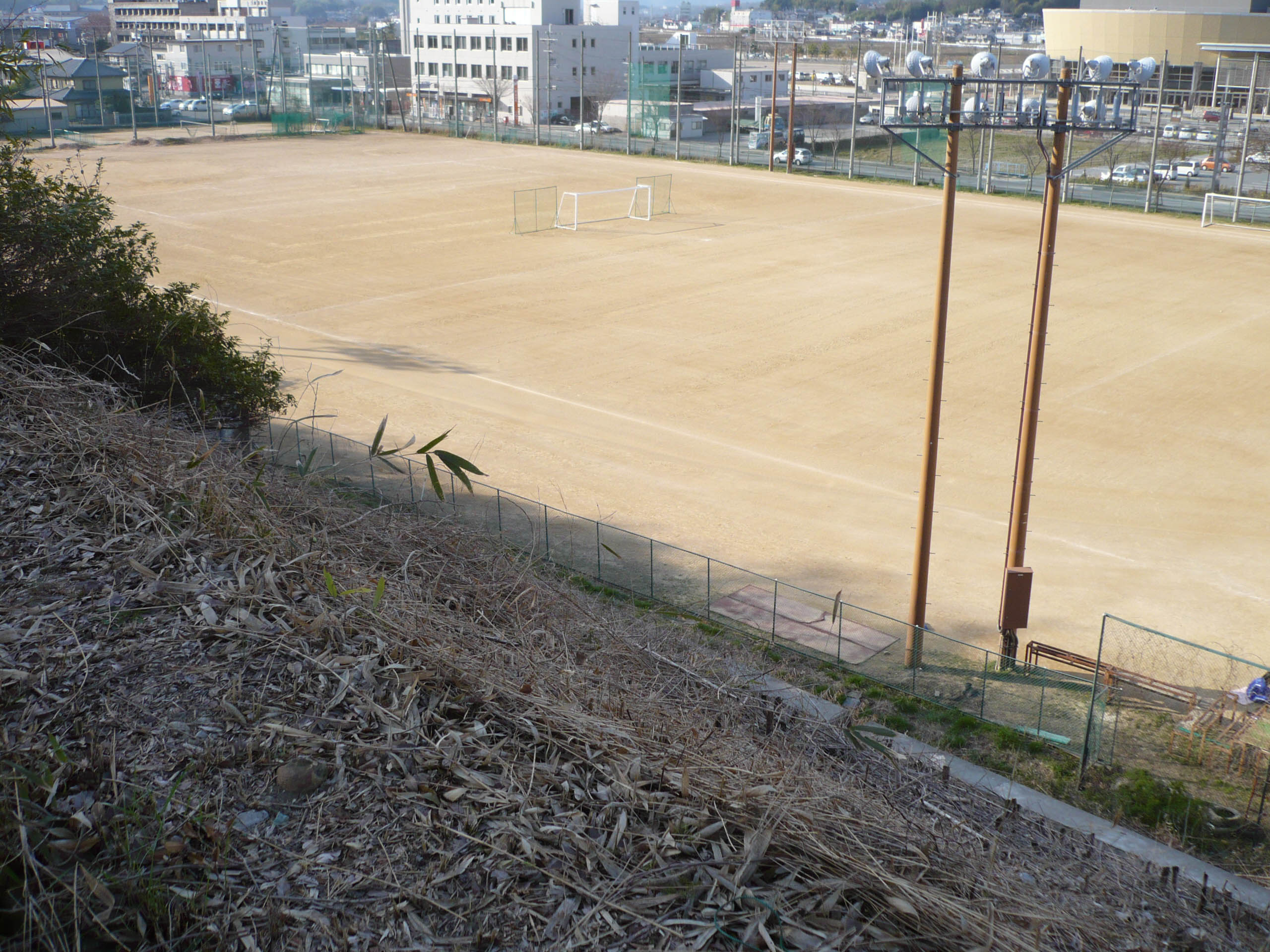 台地